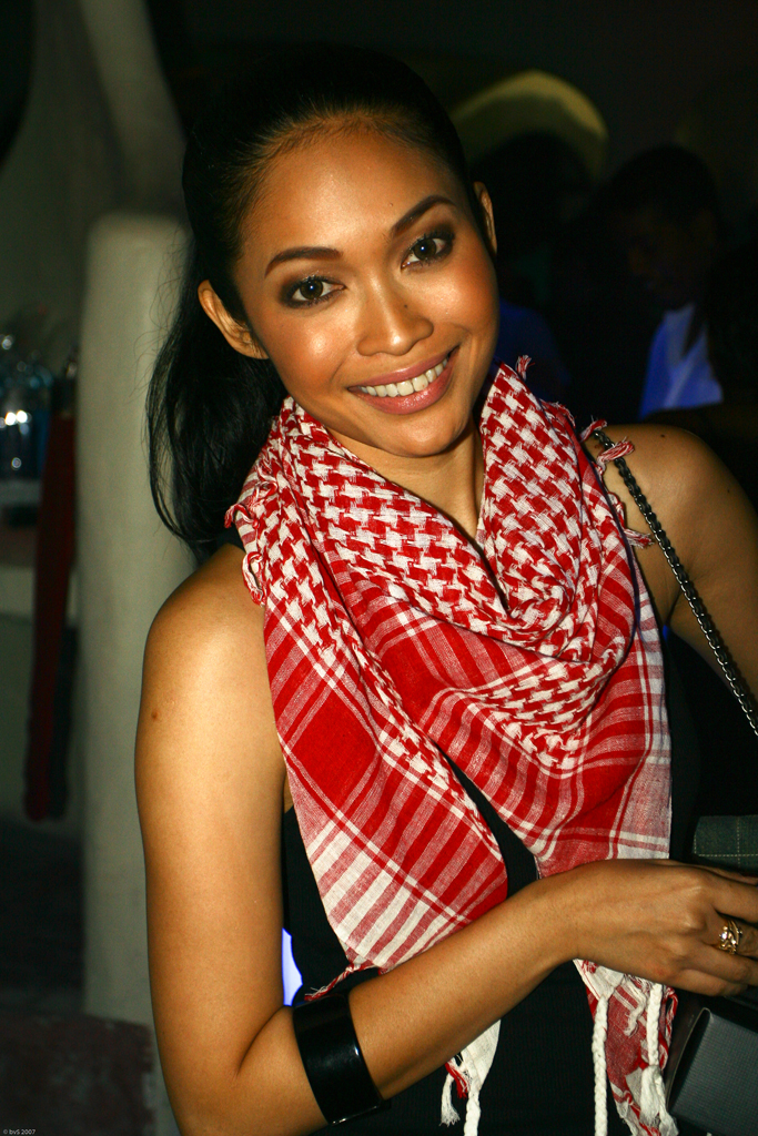 Malaysian singer Camelia